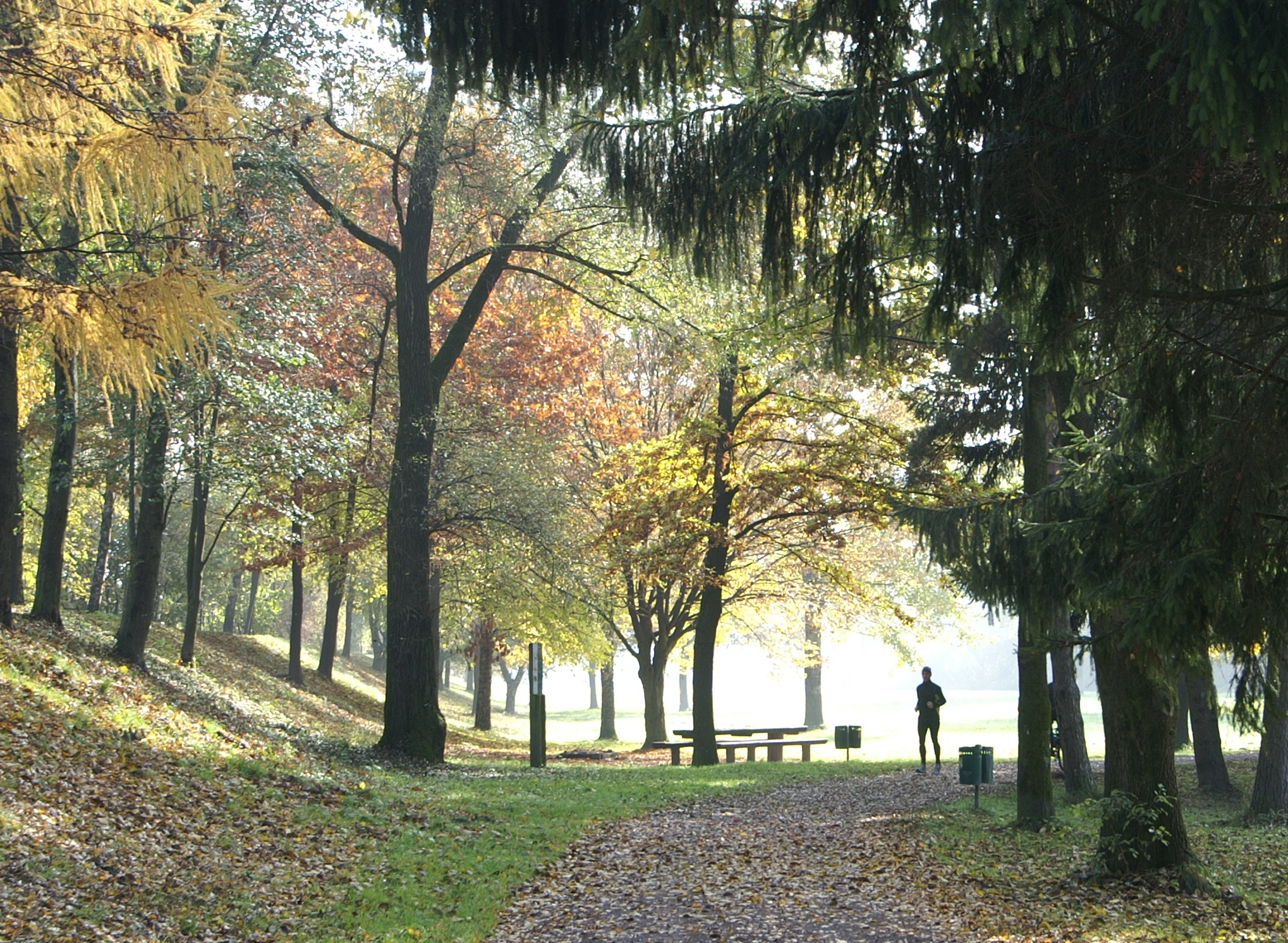 Naherholung: alter Rhein zwischen Hohenems und Lustenau in Vorarlberg